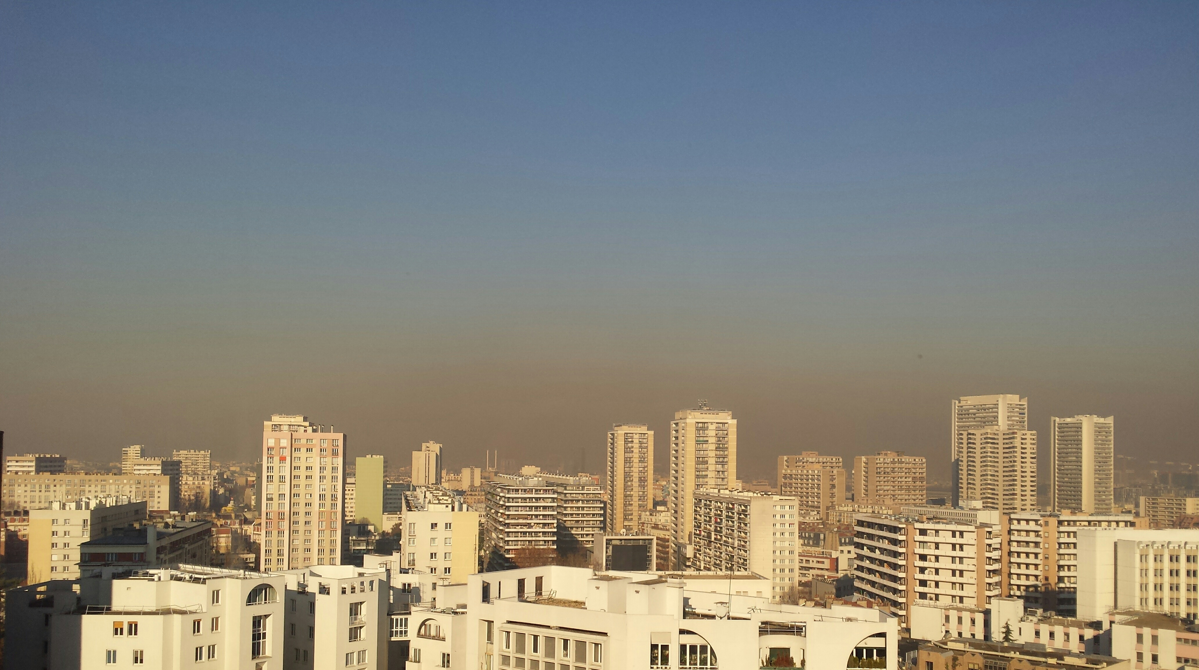 Couche de pollution sur Paris pendant un pic de pollution, vue depuis la Tour des Olympiades (Paris 13e)